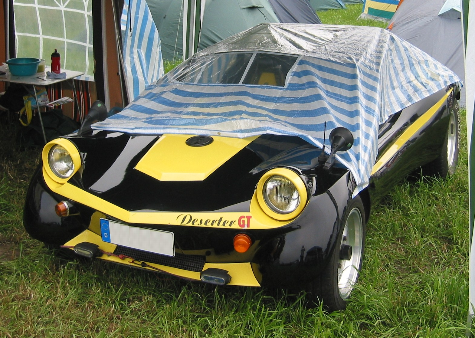 Deserter